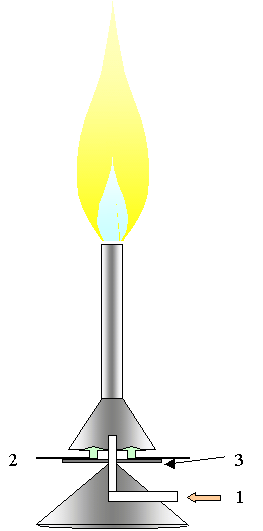 Laboratóriumokban használatos gázégő (Teclu-égő)